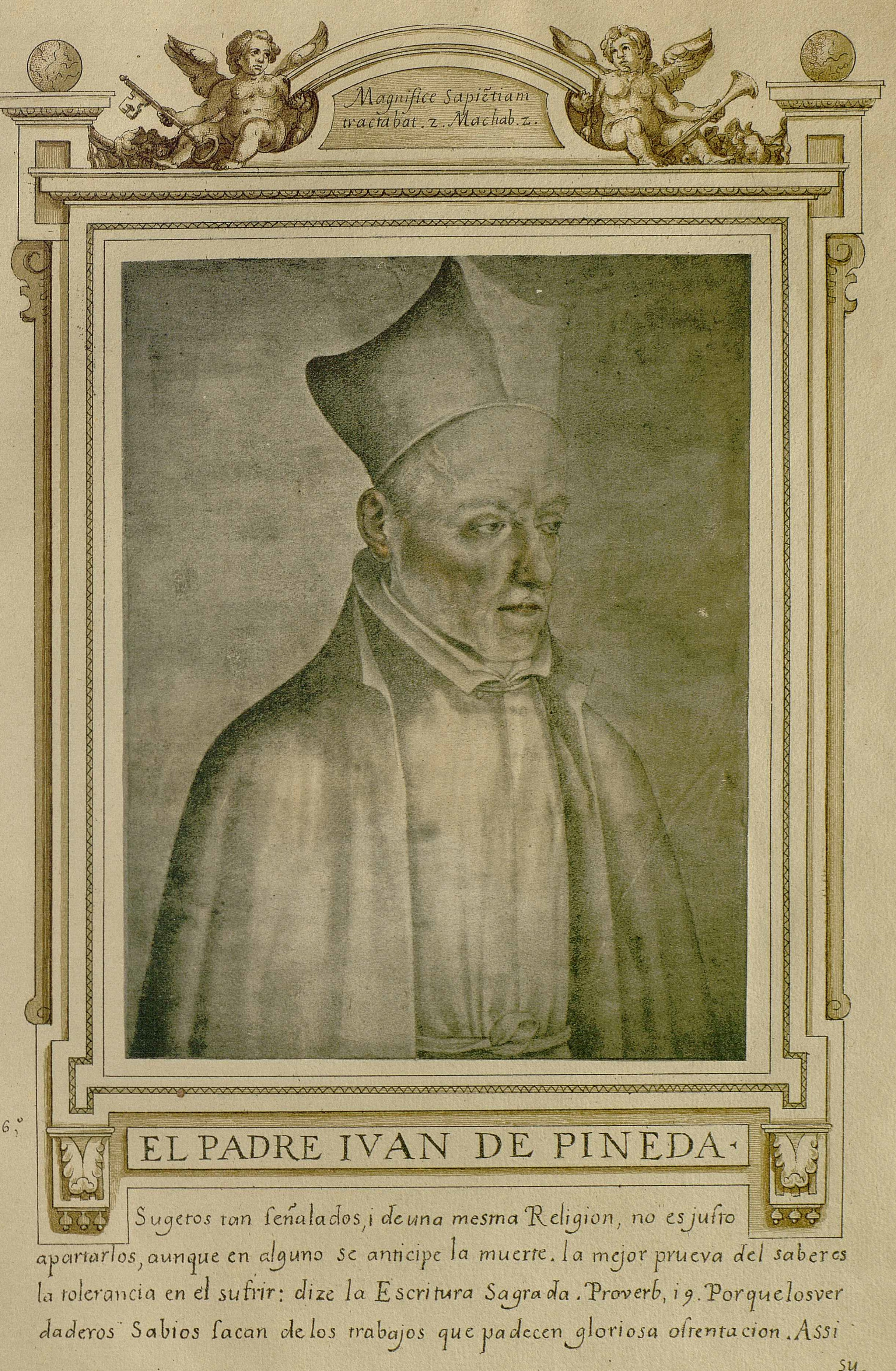 El padre Juan de Pineda, Libro de descripción de verdaderos retratos de ilustres y memorables varones, Madrid, Biblioteca de la Fundación Lázaro Galdiano